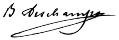 Blanche Deschamps-Jéhin Signature ohne Jahr, ohne genaue Quelle